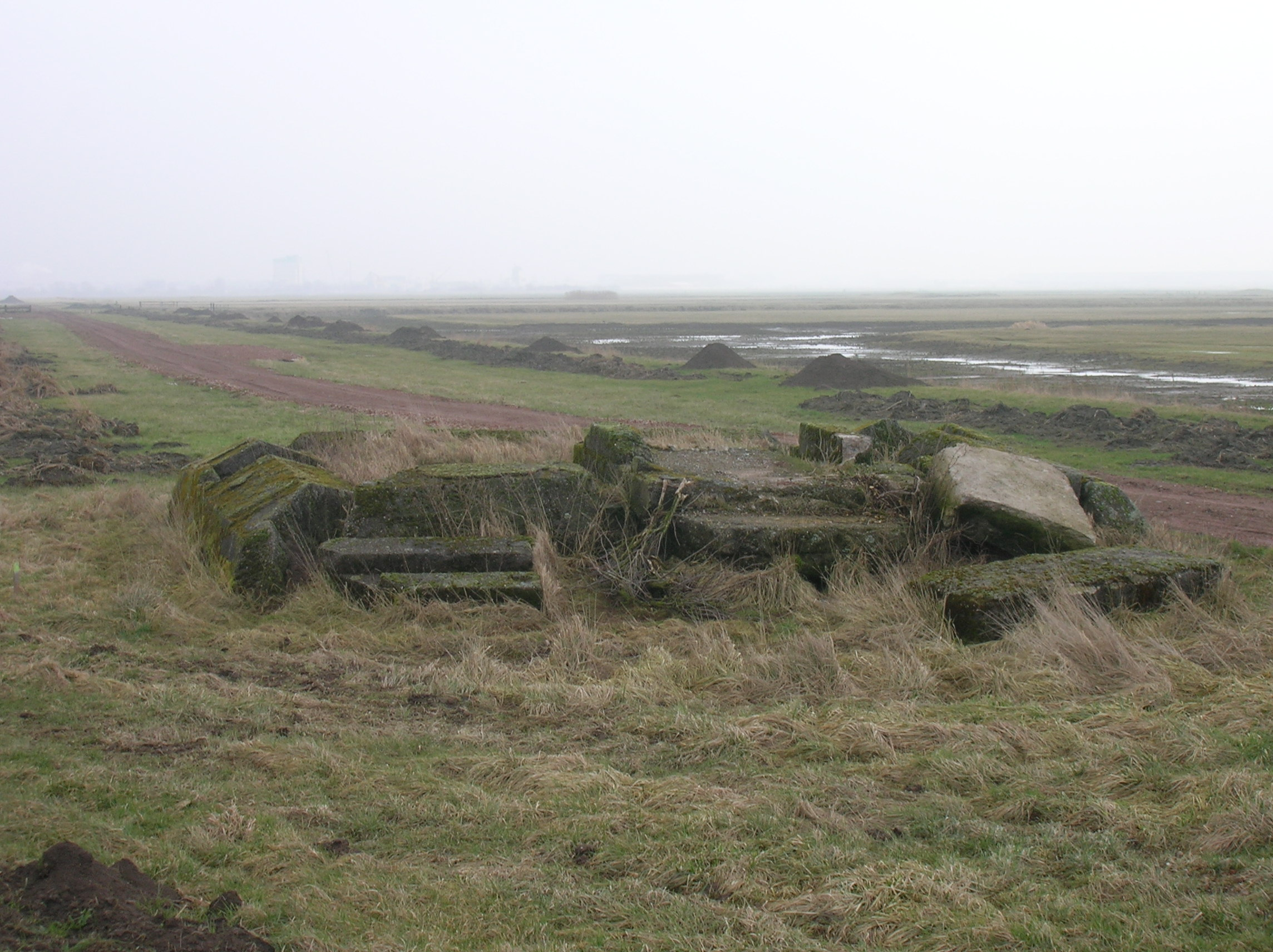 Bunkerreste der Flakbatterie Tabar in Bremerhaven.